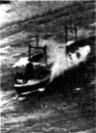 Vor Tasmanien havarierter Frachter Merino